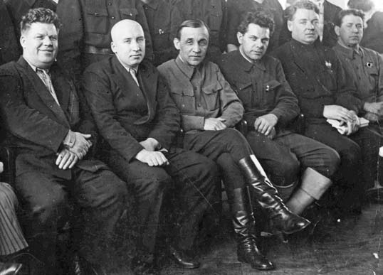 Работники Свердловского Обкома ВКП (б). 1935-1937 год. Слева направо: Г.Г.Ян, К.И.Ковалёв, К.Ф.Пшеницын, Н.Н.Лапиков, Н.А.Узюков, Г.С.Богачёв.